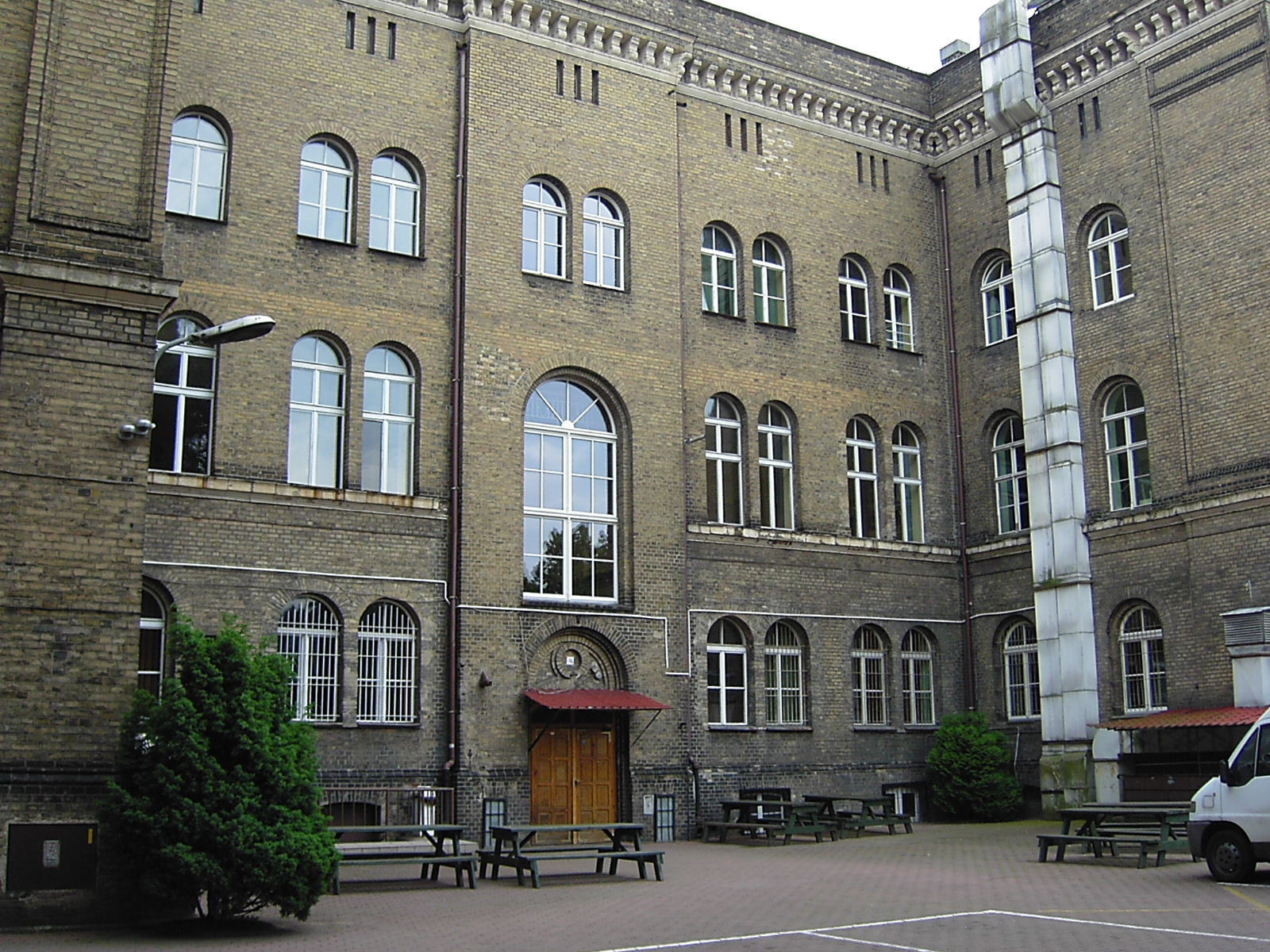 Szczecin, ul. 3 Maja 1 - szkoła (Tu w latach 40 XX w. znajdował się Miejski Urząd Bezpieczeństwa Publicznego)